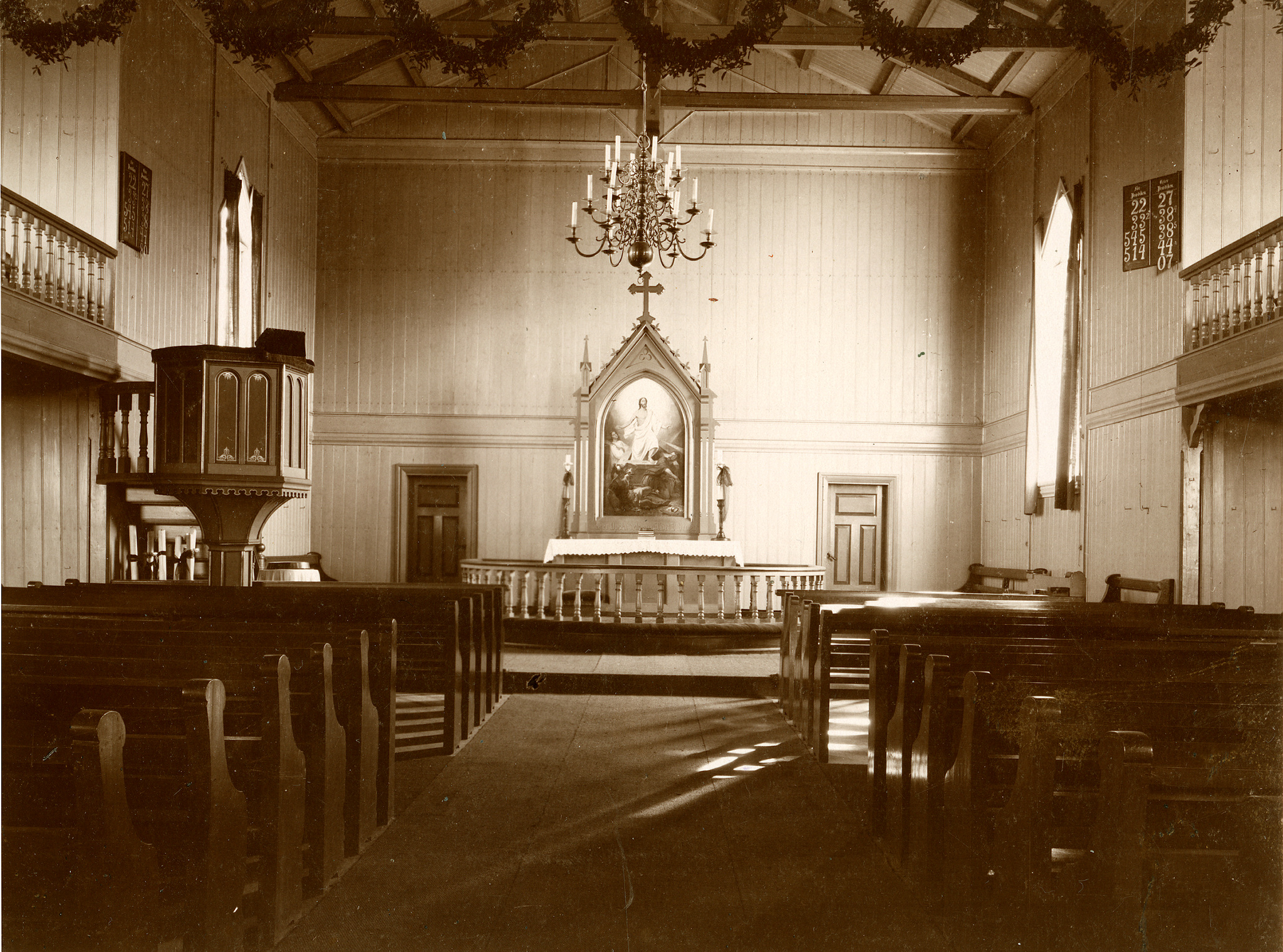 Gammelt interiørbilde fra Søndre Høland kirke. Altertavlen er malt av Christen Brun i kopi etterAdolph Tidemands «Oppstandelsen» i Bragernes kirke. Fra Riksantikvarens Kulturminnebilder.